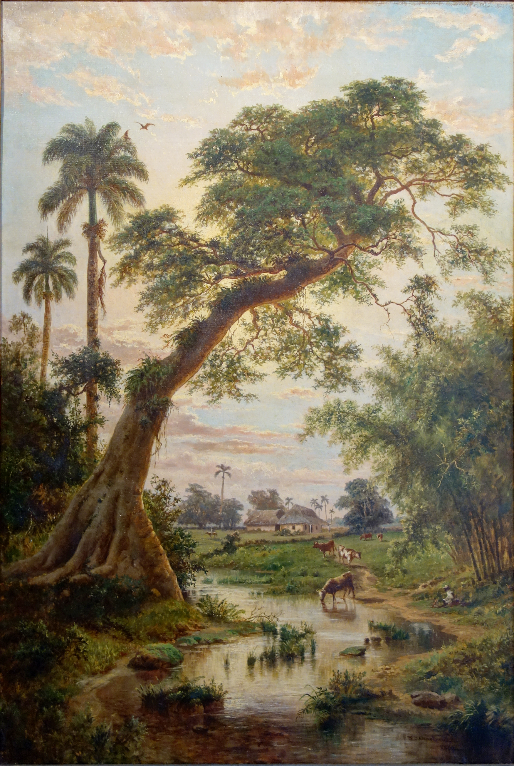 Paisaje cubano (Paysage cubain) au Palacio de los Capitanes Generales, La Havane.